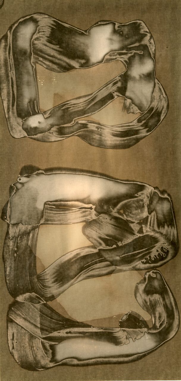 Serie fotografica : Italia, 1970 / Paolo Monti. - Stampe: 4 : Chimigramma, gelatina bromuro d'argento/ carta, 12x25. - ((Sul coperchio della scatola iscrizione didascalica manoscritta a pennarello nero: "2CH".